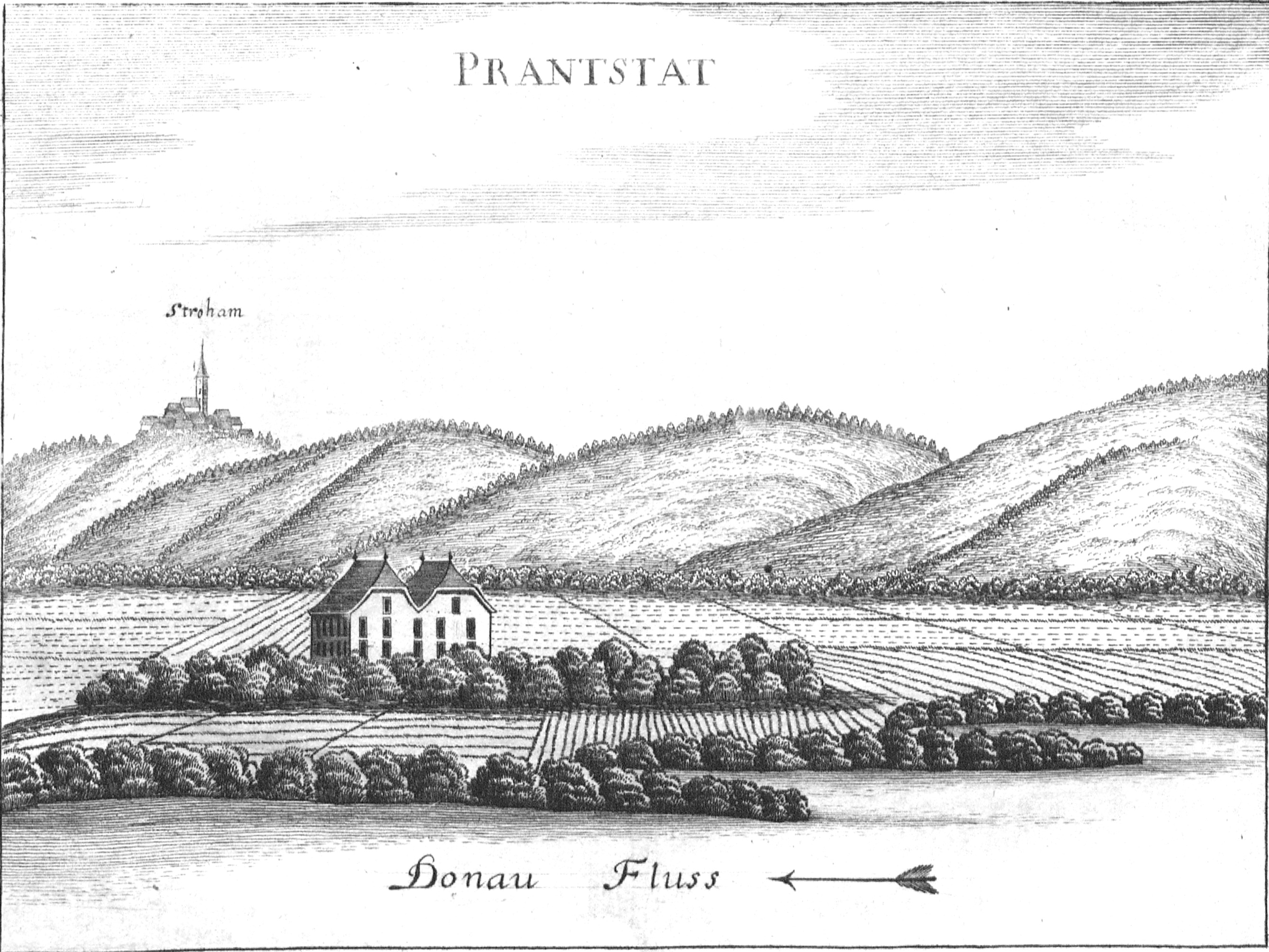 Kupferstich, Ansicht von Schloss Brandstatt